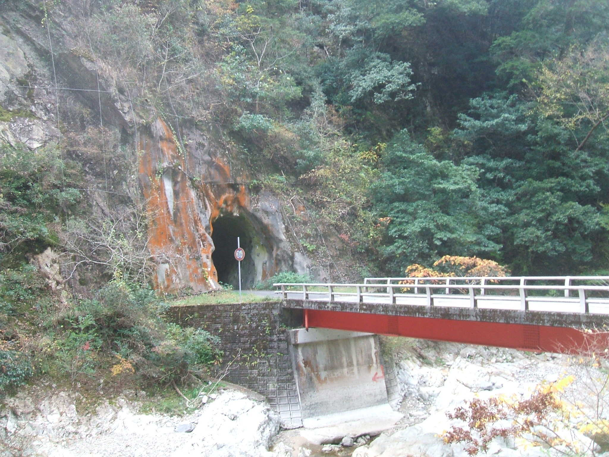 広島県福山市山野町にある猿鳴橋と猿鳴橋